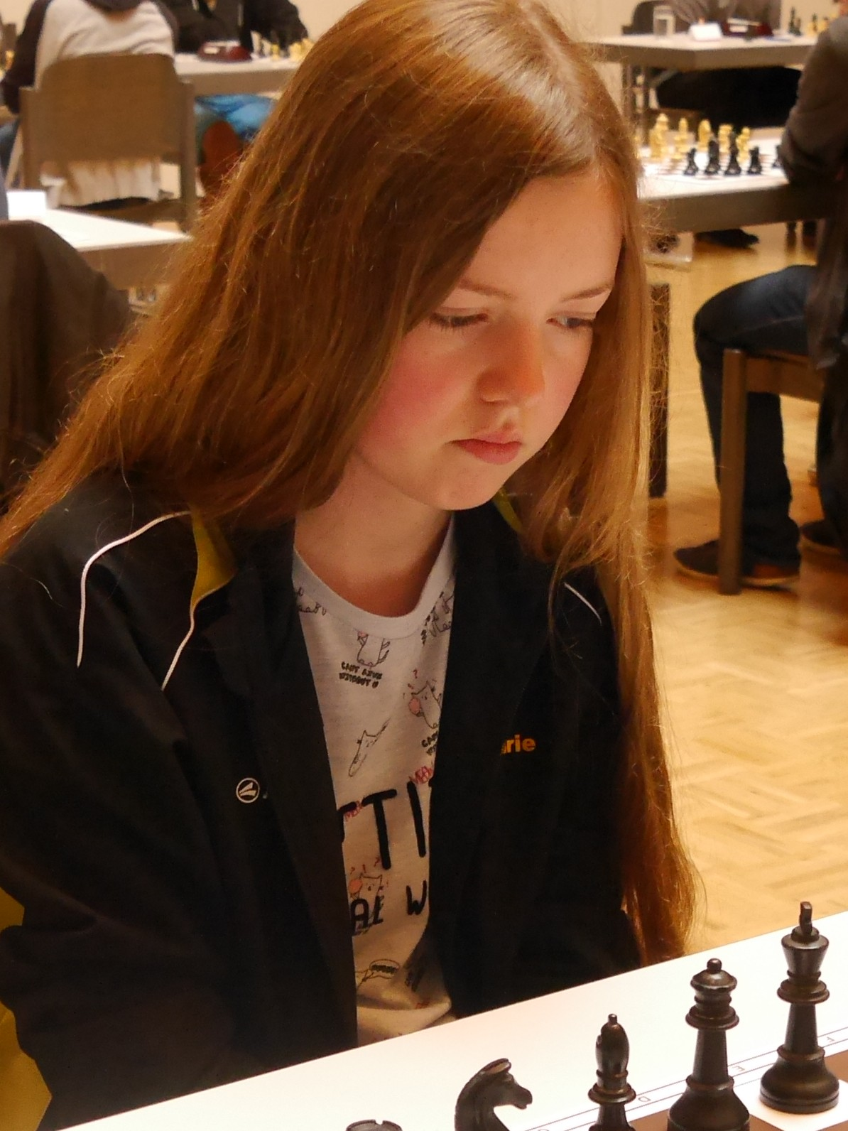 Annmarie Mütsch, Schachländerkampf Baden-Elsass 2016 im Bürgerhaus Zähringen